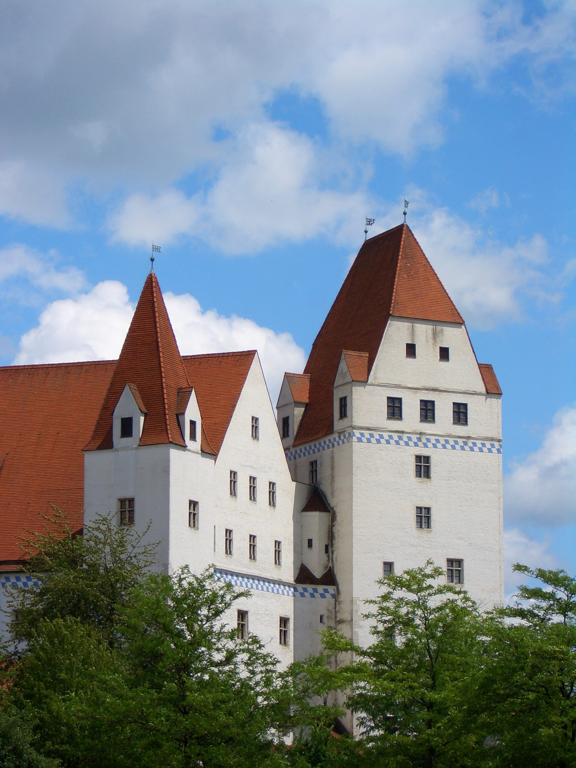 Neues Schloss in Ingolstadt von Südwest